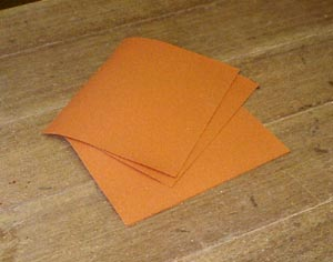 Sandpaper